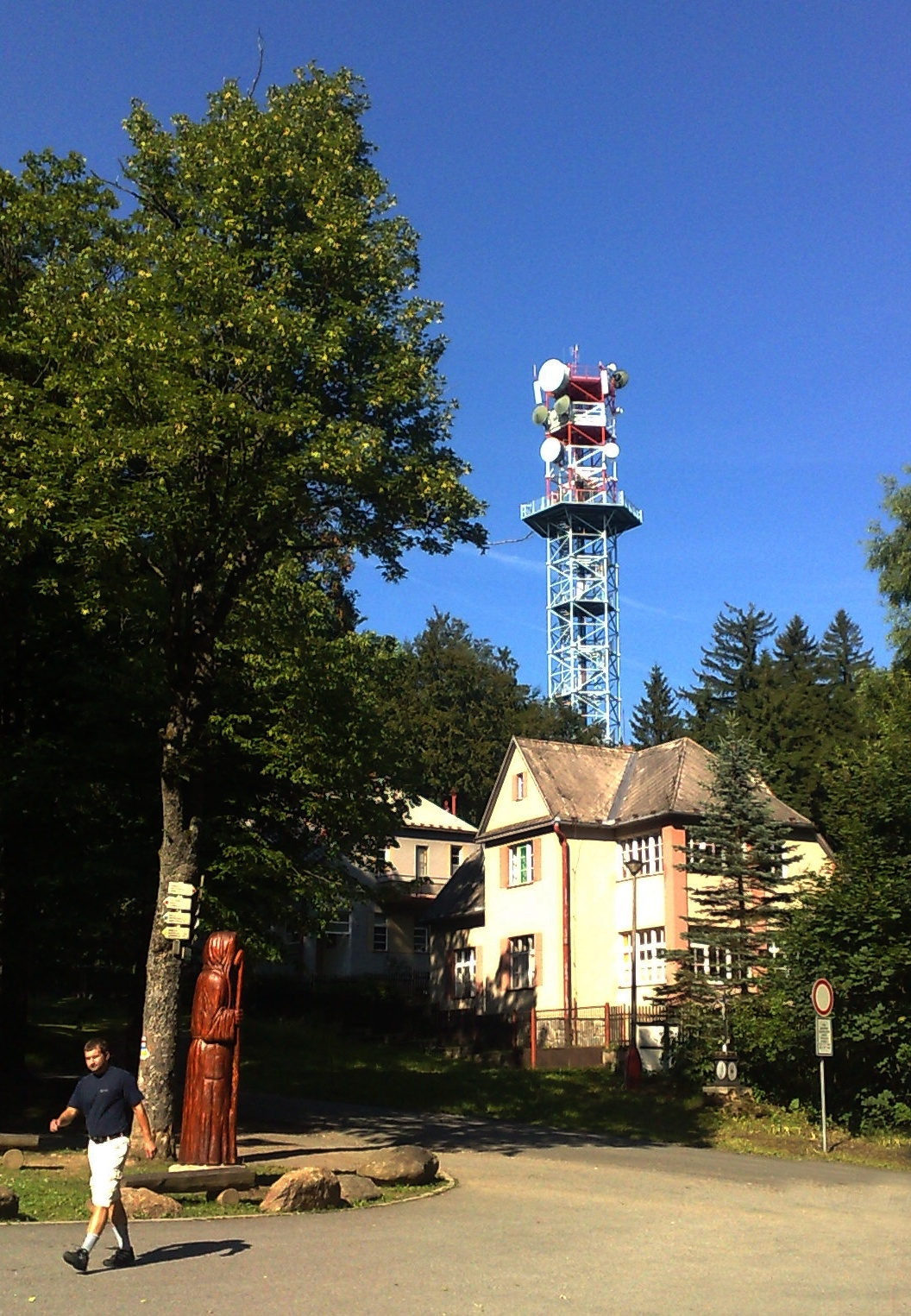 Rozhledna Křemešník